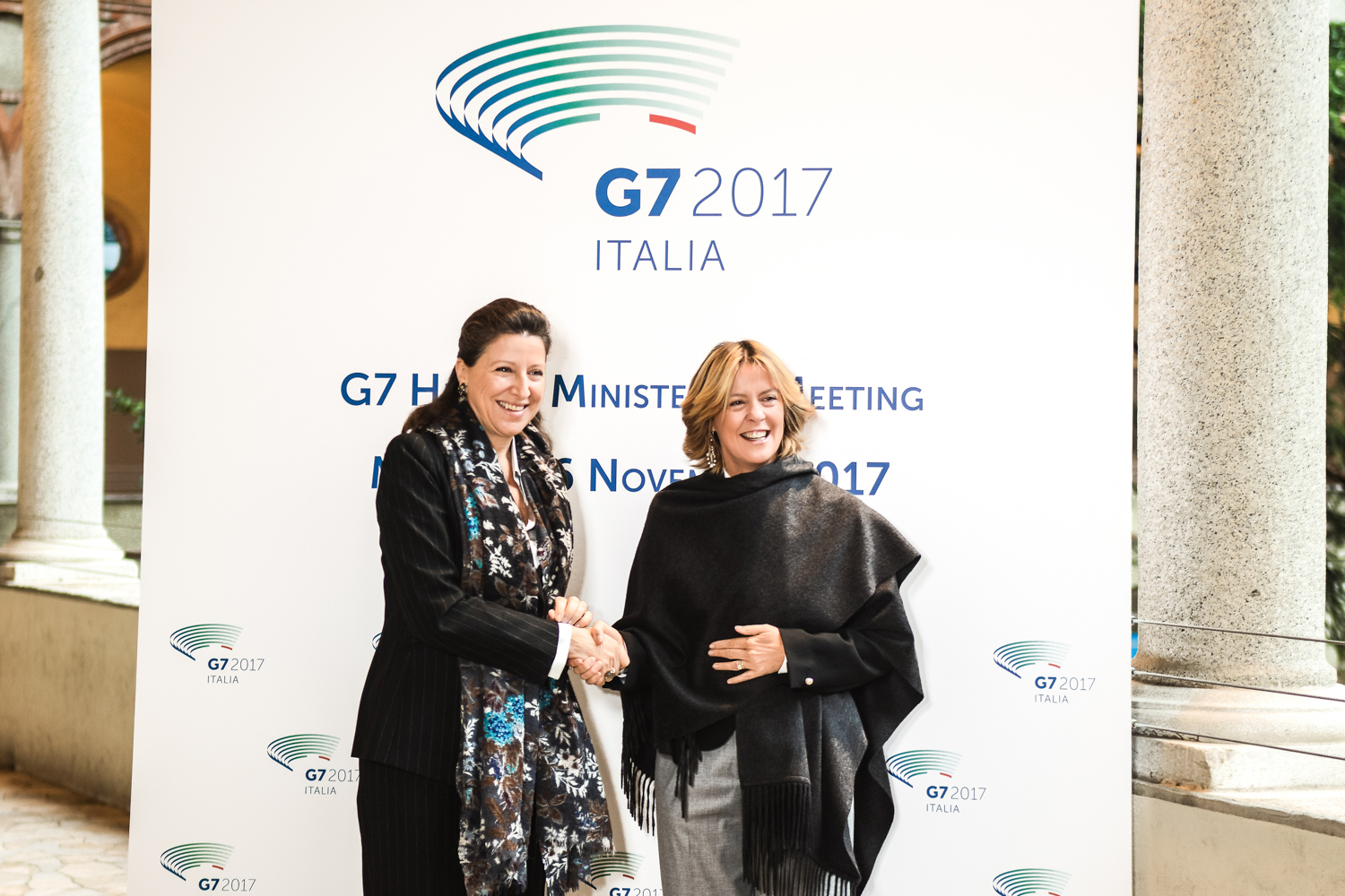 Agnès Buzyn (Ministre des Solidarités et de la Santé) et Beatrice Lorenzin (Ministre italienne de la Santé) lors d'une réunion des ministres de la Santé du G7